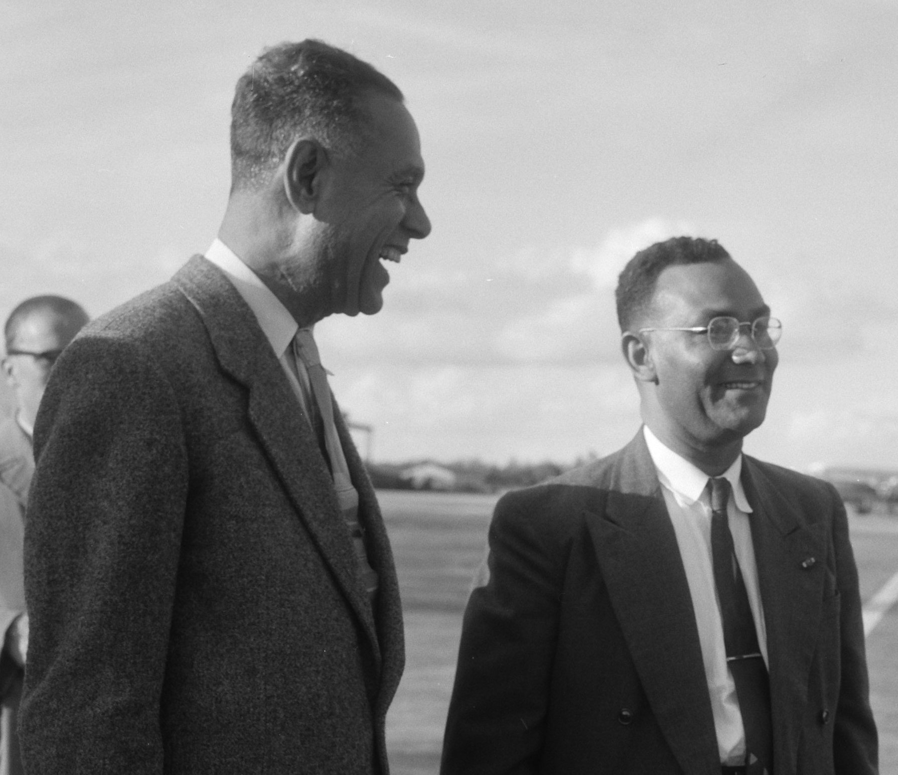 Collectie / Archief : Fotocollectie Anefo Reportage / Serie : [ onbekend ] Beschrijving : Ministeriele Residentie van de Antillen in Nederland. Dr. J. Ferrier , minister van Financien W. Smit en minister Helders / aangetast Datum : 11 juni 1957 Persoonsnaam : Dr. J. Ferrier, Helders, G.Ph. Fotograaf : Pot, Harry / Anefo Auteursrechthebbende : Nationaal Archief Materiaalsoort : Negatief (zwart/wit) Nummer archiefinventaris : bekijk toegang 2.24.01.04 Bestanddeelnummer : 908-6687